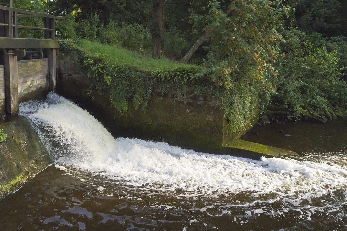 Stuw bij de watermolen Singraven, oude Dinkelomleiding, Schiphorstdijk, Denekamp